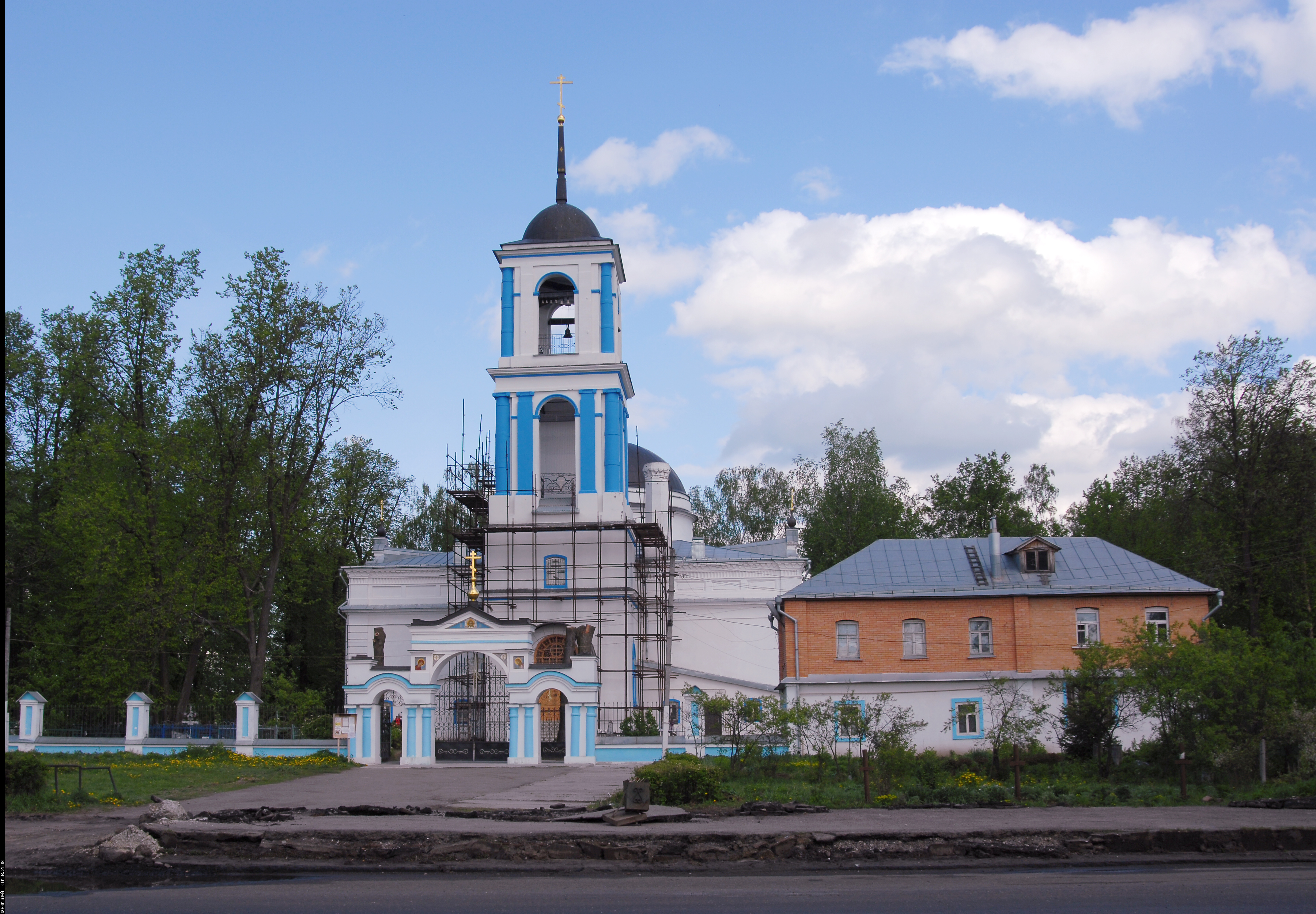 17/05/2008 Однокупольная церковь в стиле классицизма с трапезной и колокольней. В трапезной, построенной заново в 1892—1894 годах, Казанский и Пятницкий приделы. Закрыта в 1941 году. Открыта в 1990 году, продолжается ремонт